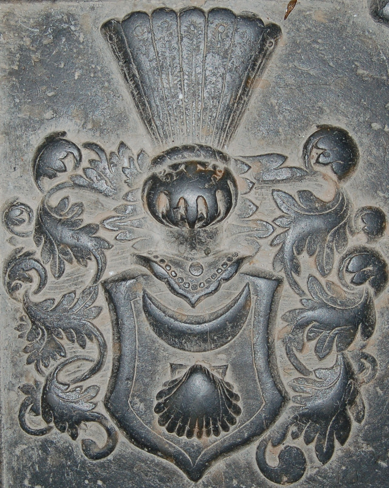 Våpenskjold for slekten Baden på gravplate i Hedrum kirke (Iver's plate)